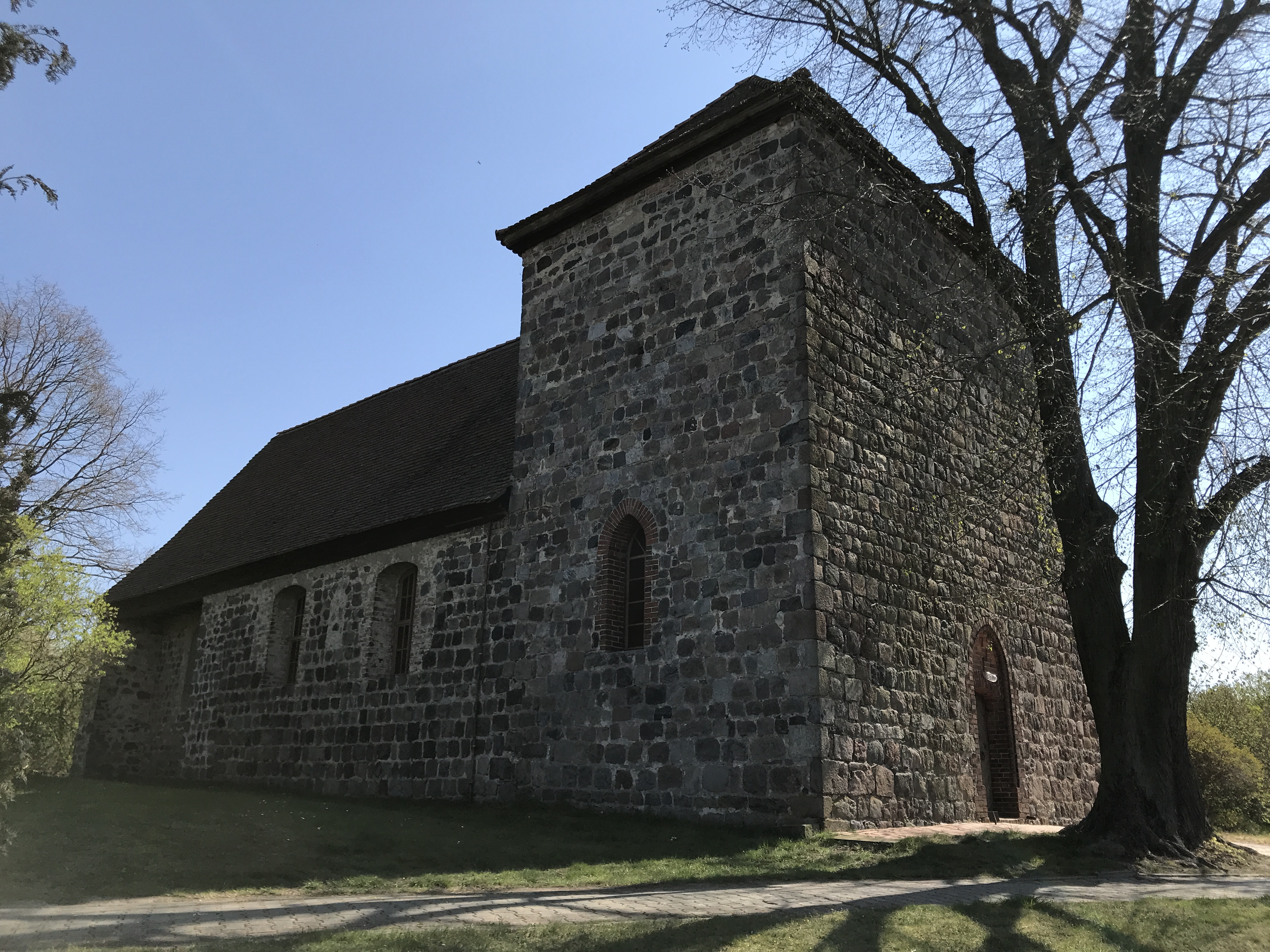 Die Dorfkirche Michelsdorf ist eine Feldsteinkirche in Michelsdorf, einem Ortsteil der Gemeinde Kloster Lehnin im Landkreis Potsdam-Mittelmark in Brandenburg. Im Innern befinden sich unter anderem die Reste einer Ausmalung aus dem Jahr 1946.